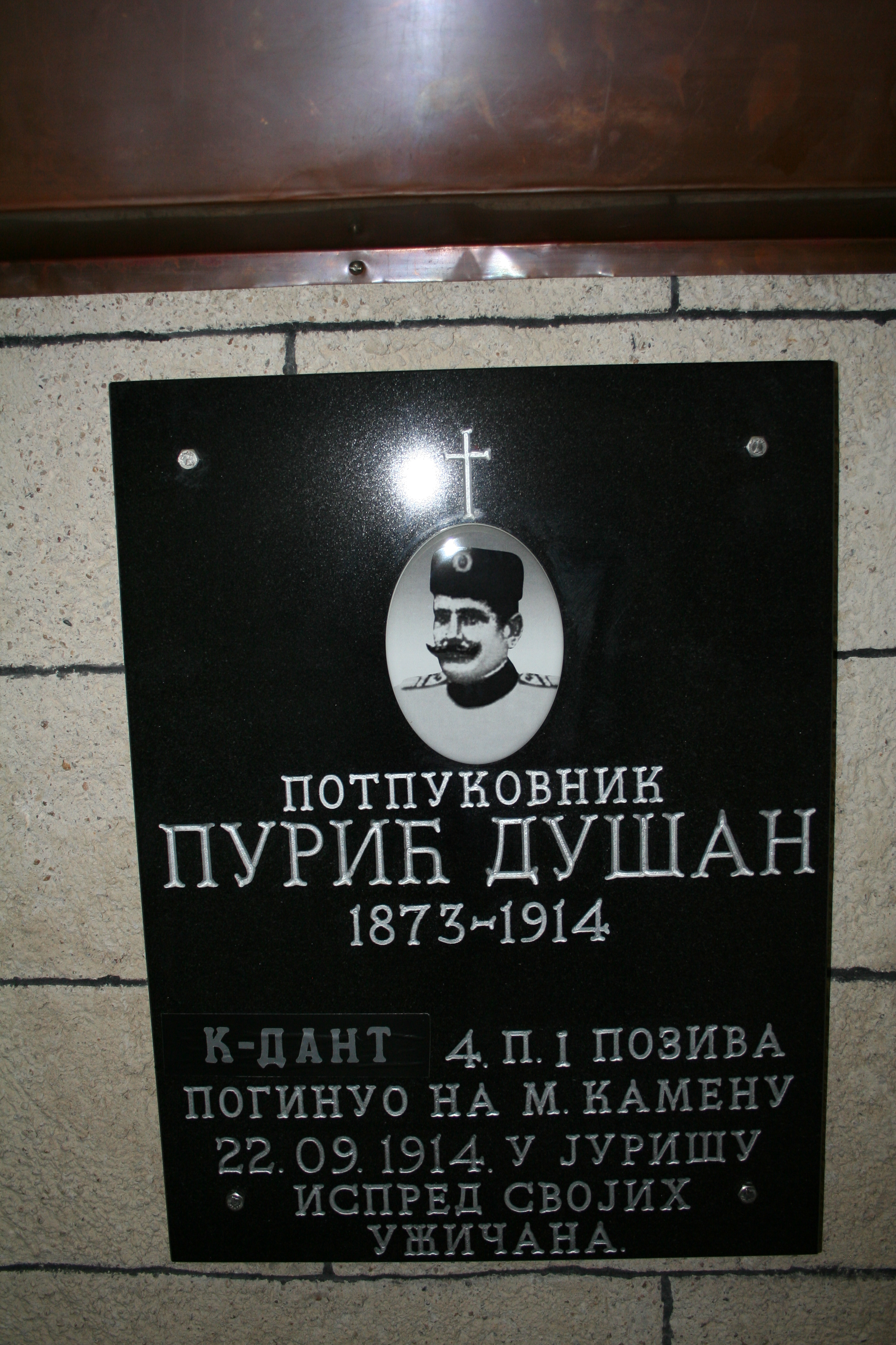 Kripta sa kostima poginulih ratnika na Mačkovom kamenu u toku I svetskog rata, Crkva Vaznesenja Gospodnjeg, Krupanj